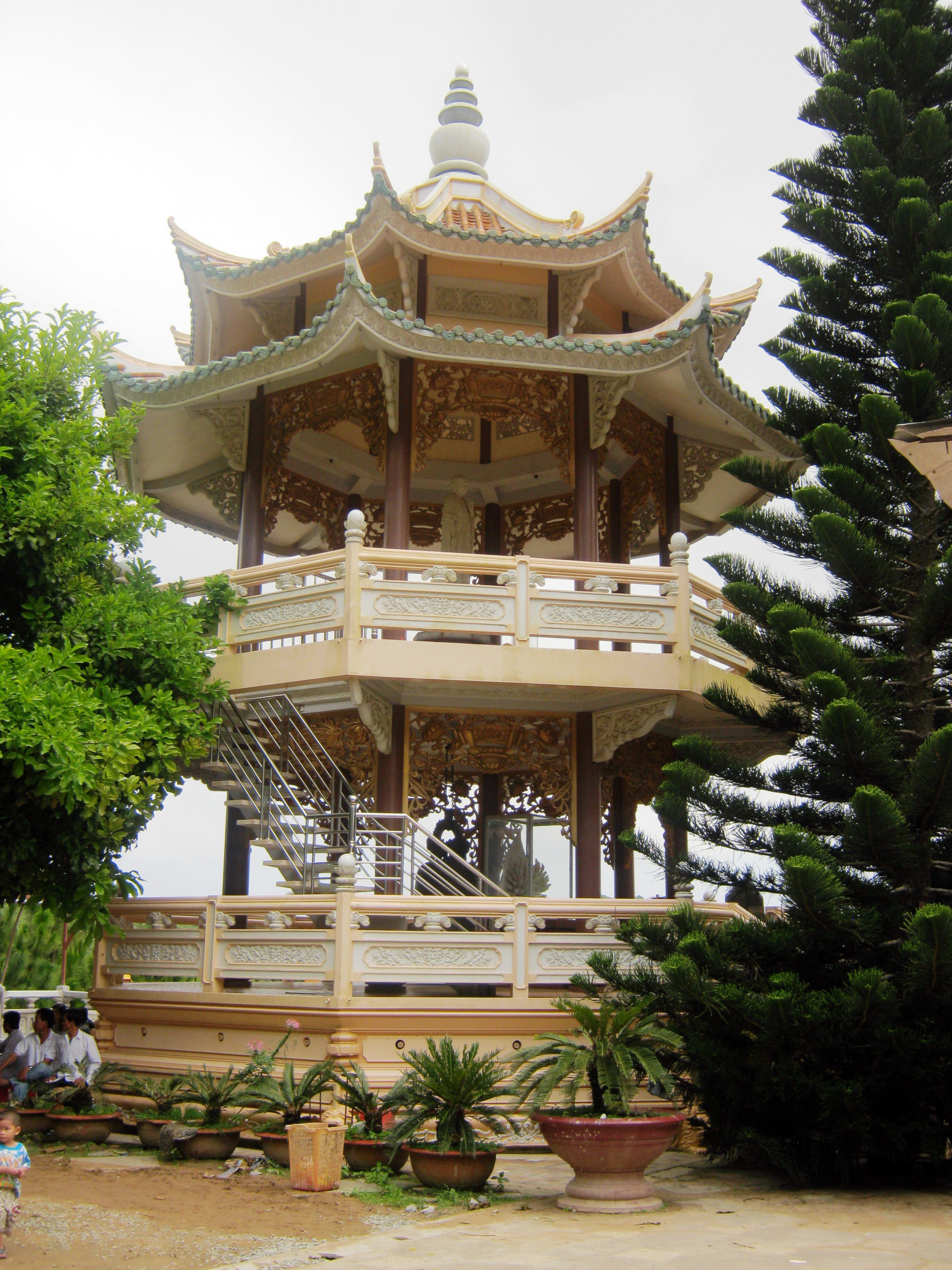 Tháp chuông chùa Vạn Linh trên đỉnh núi Cấm (Tịnh Biên, An Giang, Việt Nam).